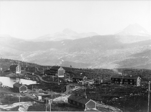 Boligene på Jakobsbakken i forbindelse med gruvene. 1910 SG.F.10009-1822